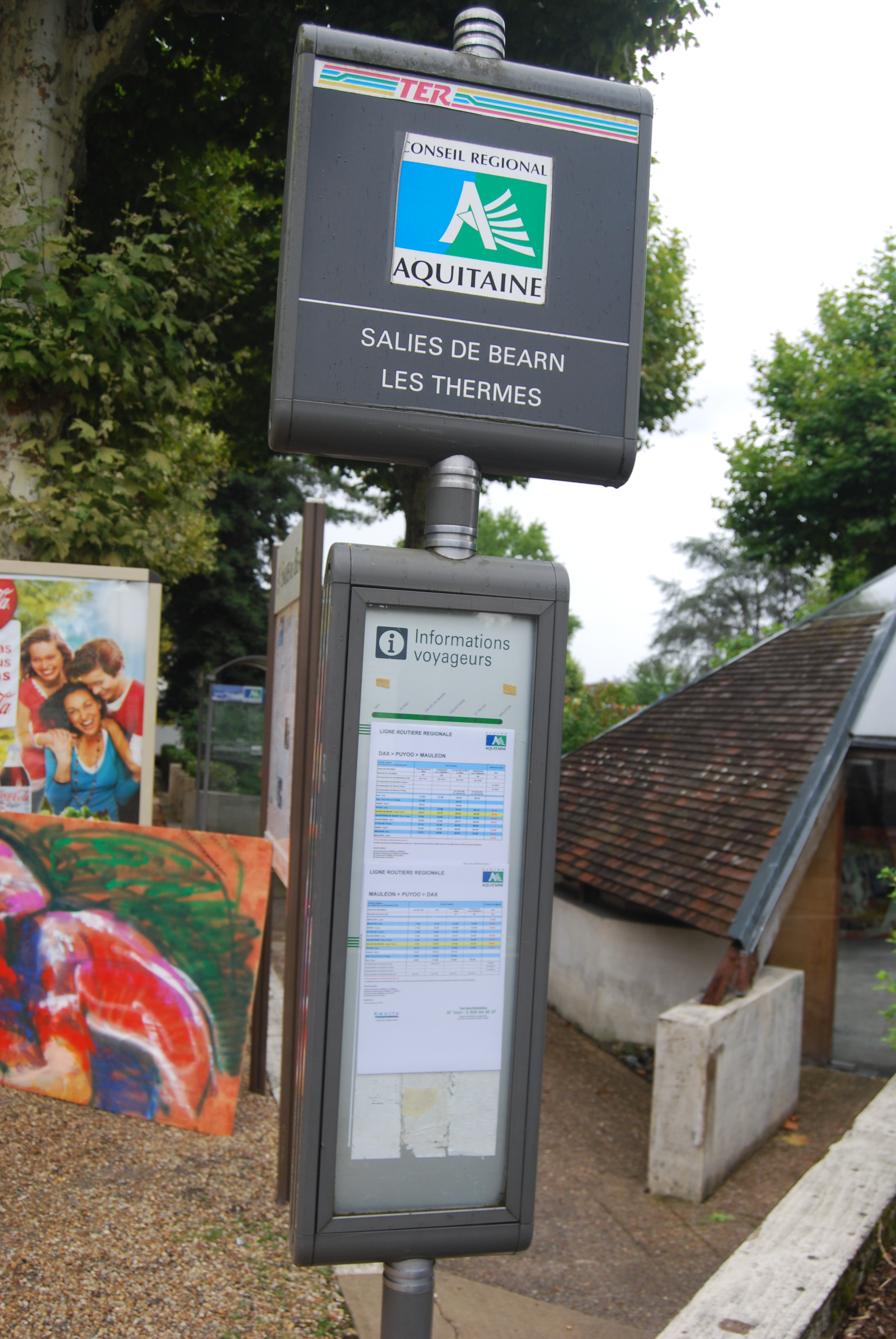 Point d'arrêt du bus TER Aquitaine à Salies-de-Béarn.